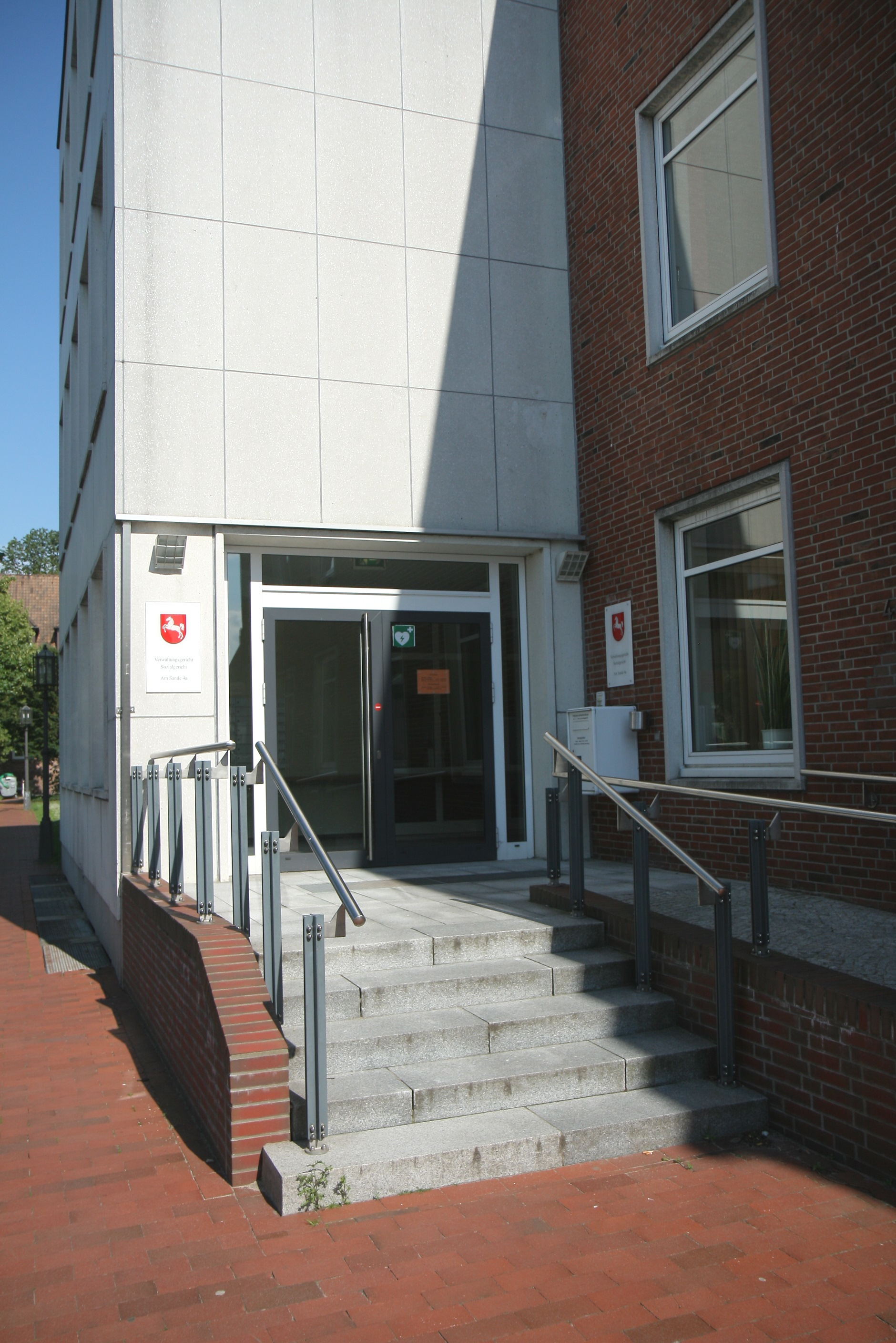 Verwaltungsgericht Stade| und Sozialgericht Stade in Stade, Am Sande 4 a.